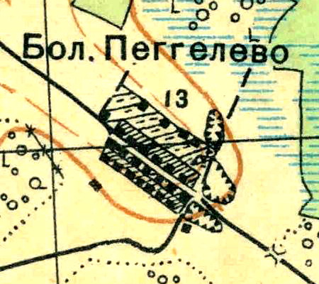 Топографическая карта Ленинградской области, квадрат О-36-13-А-а (Большая Пудость), деревня Пегелево